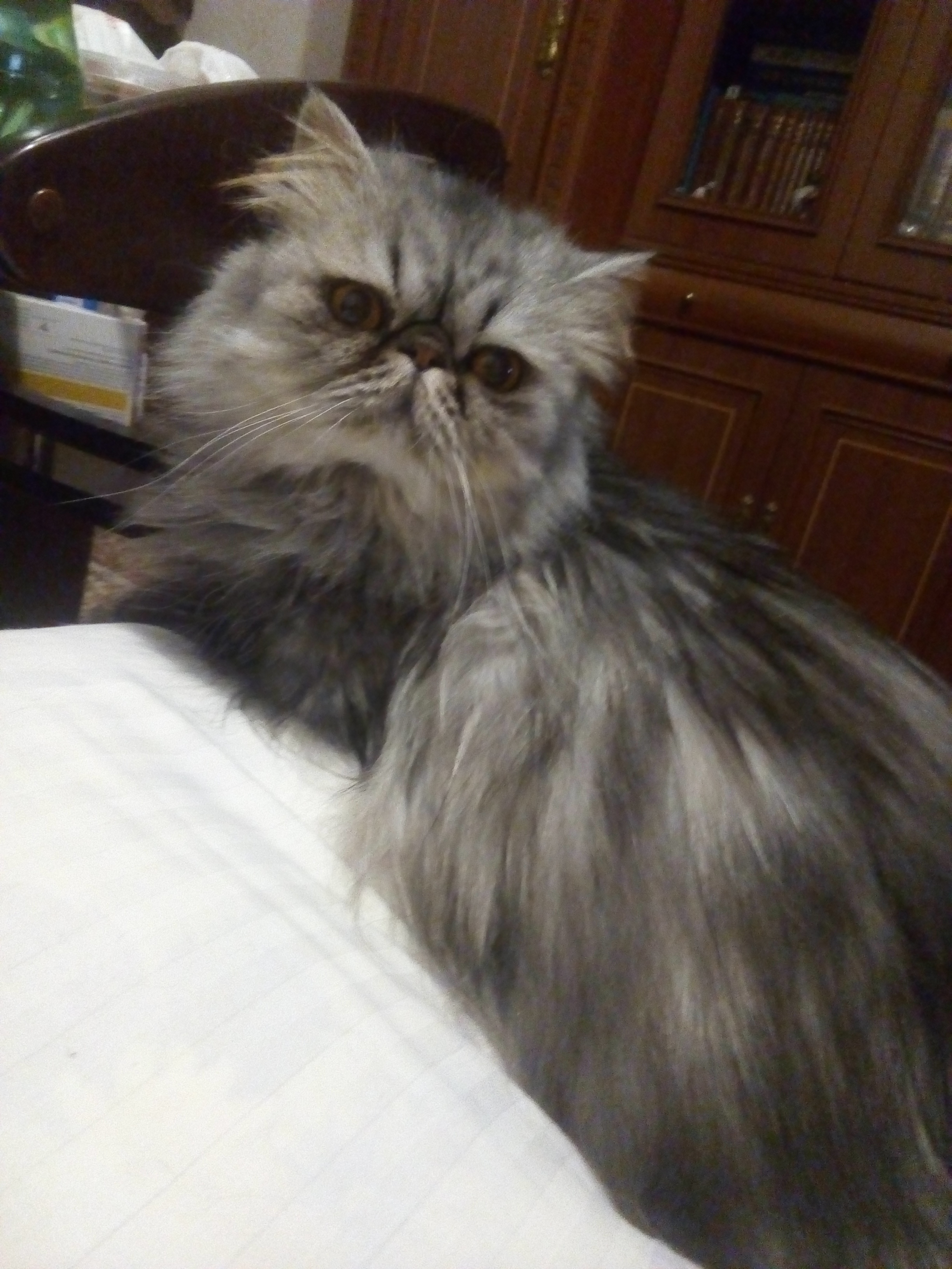 Персидский кот Стёпа